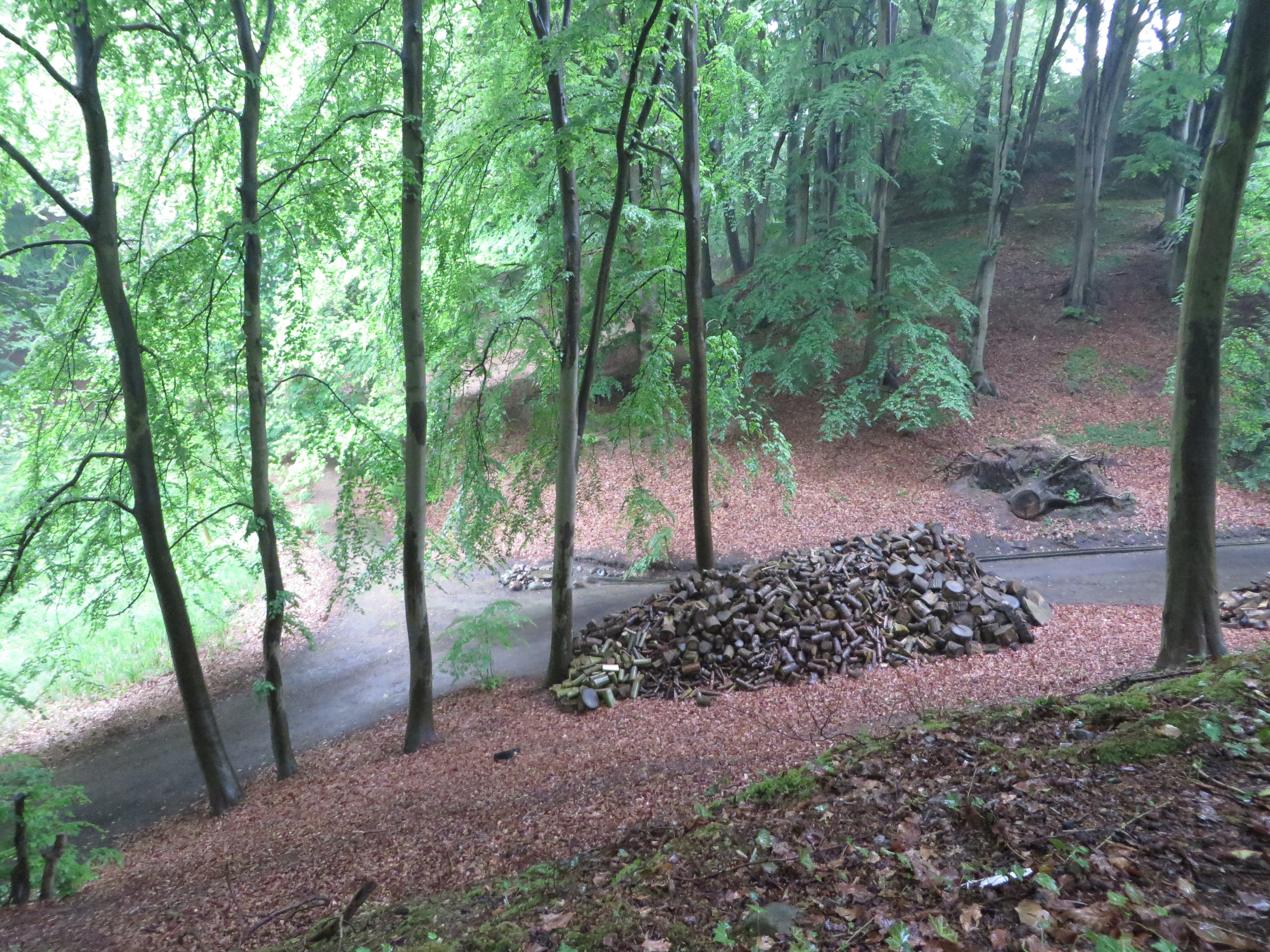 Blick runter zum Weg der Cäcilienschlucht (Mai 2015)